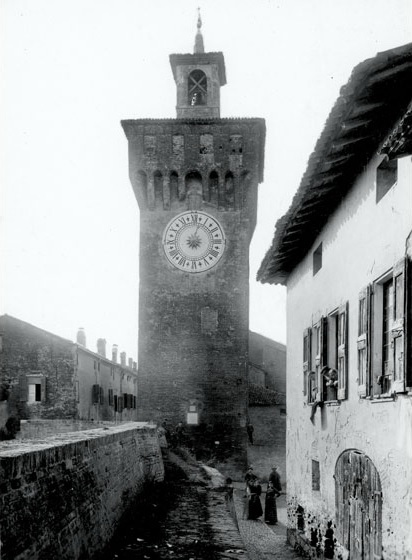 Torre dei Modenesi alla fine del XIX secolo, prima dell'interramento del fiume Panaro avvenuta nel 1890